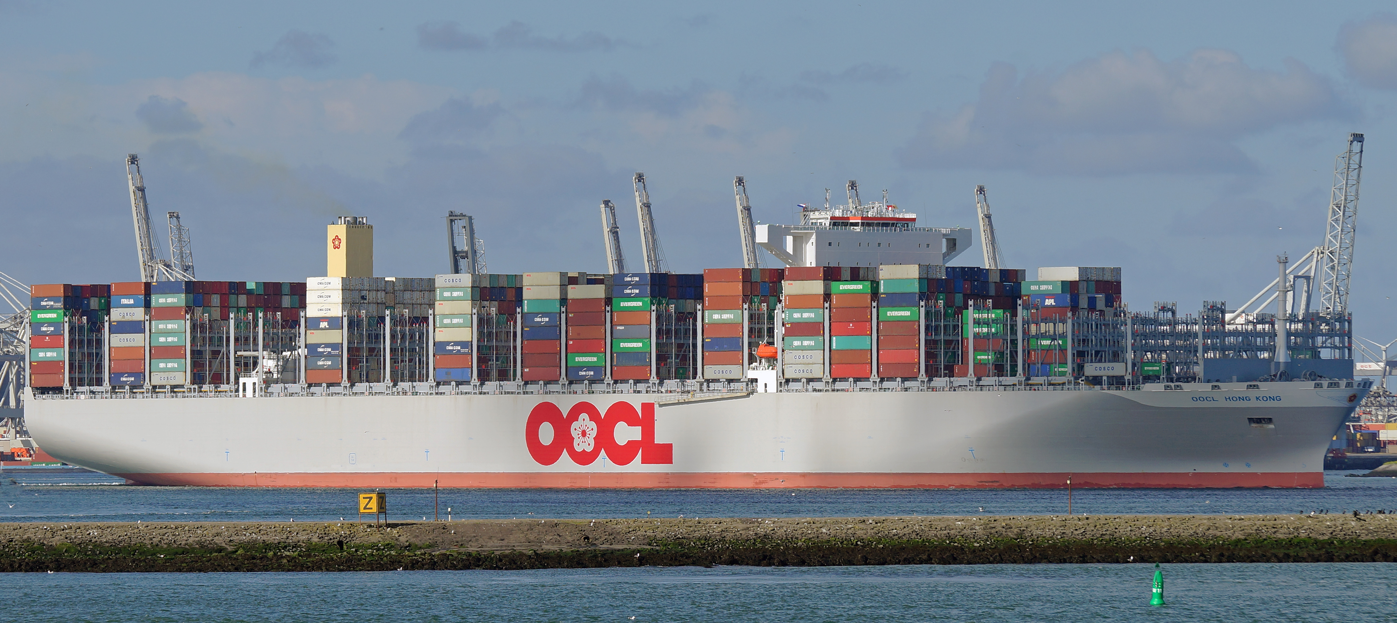 Maasmond 26-6-2017